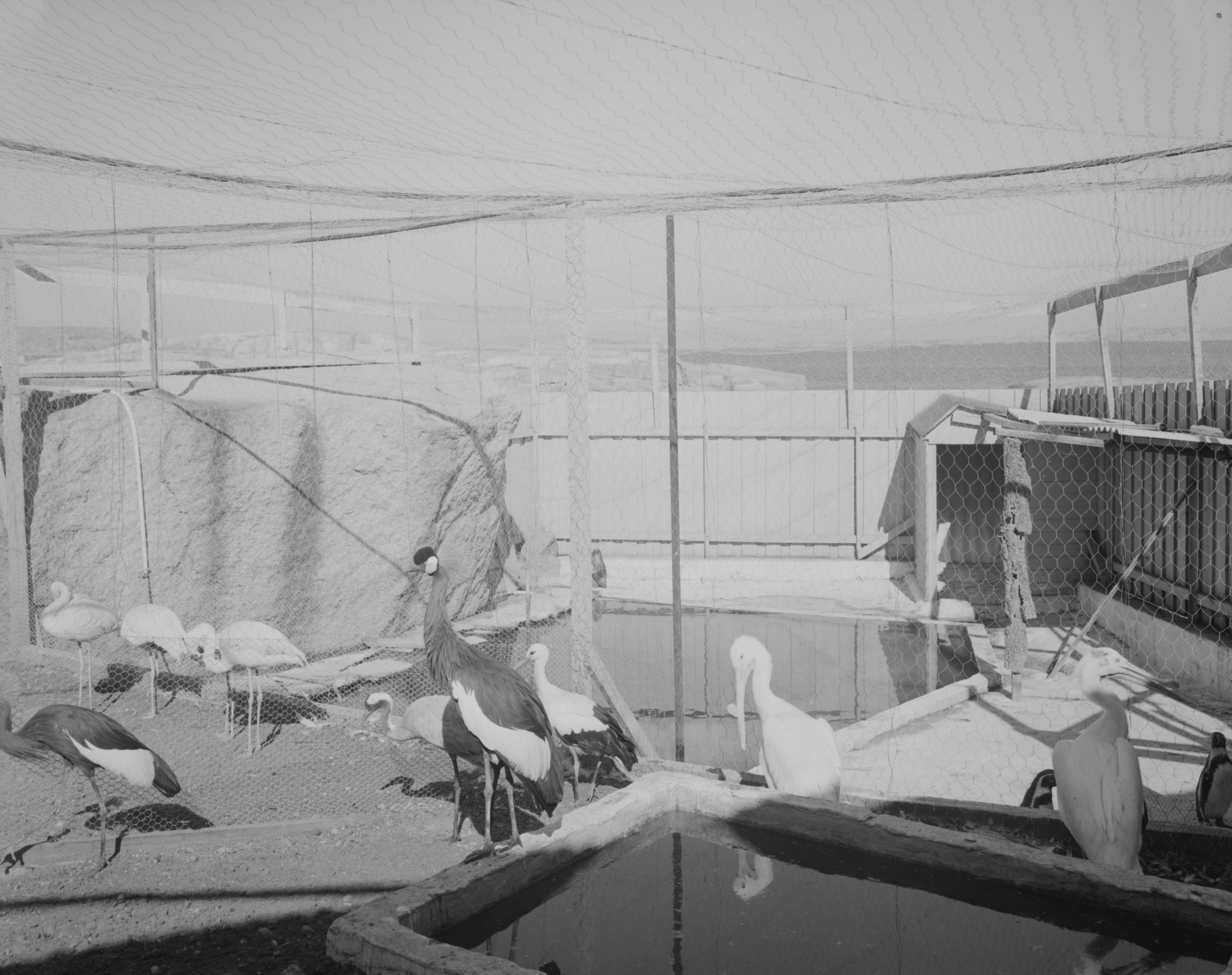 Bildet er hentet fra Nasjonalbibliotekets bildesamling Verdens Ende, Tjøme, Vestfold